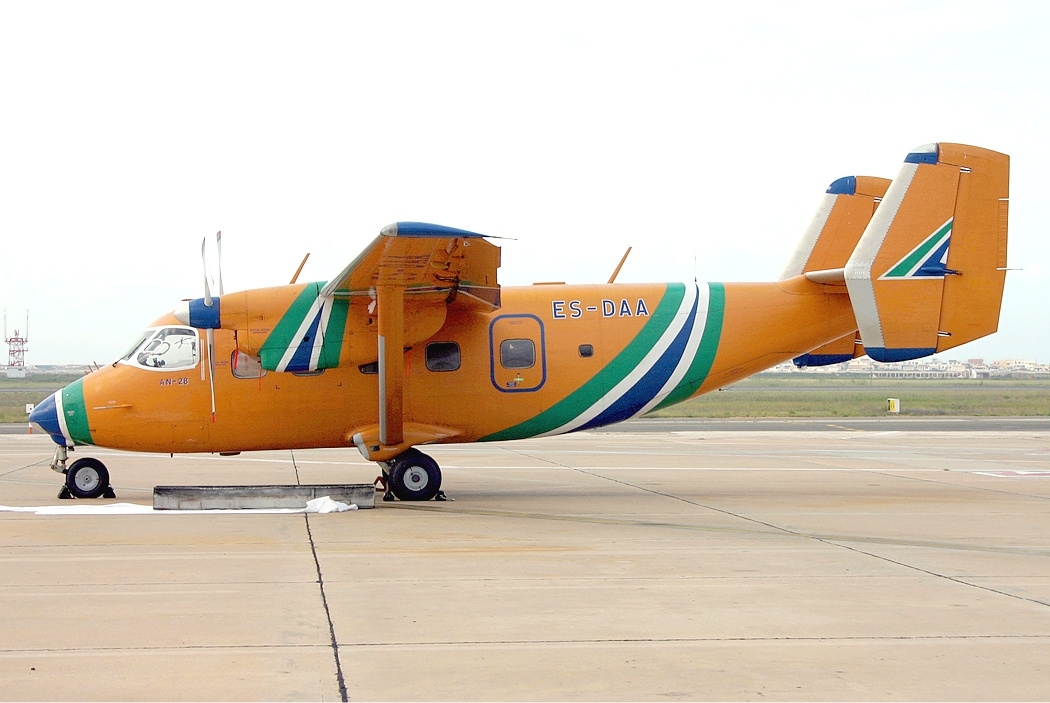 Air Livonia Antonov An-28